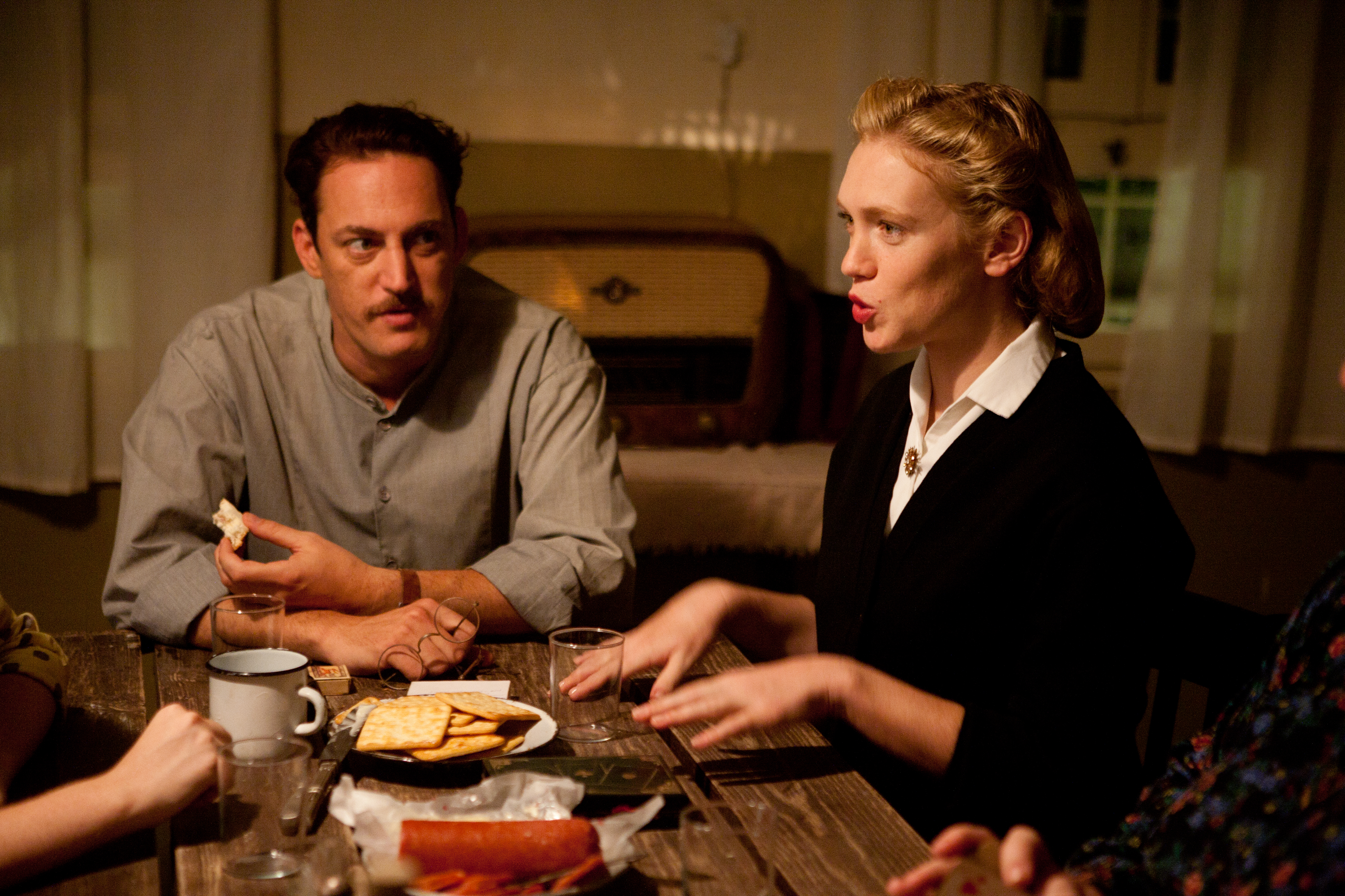 אלונה איב ויחזקאל לזרוב בסרטה של דינה צבי ריקליס ברקיע החמישי